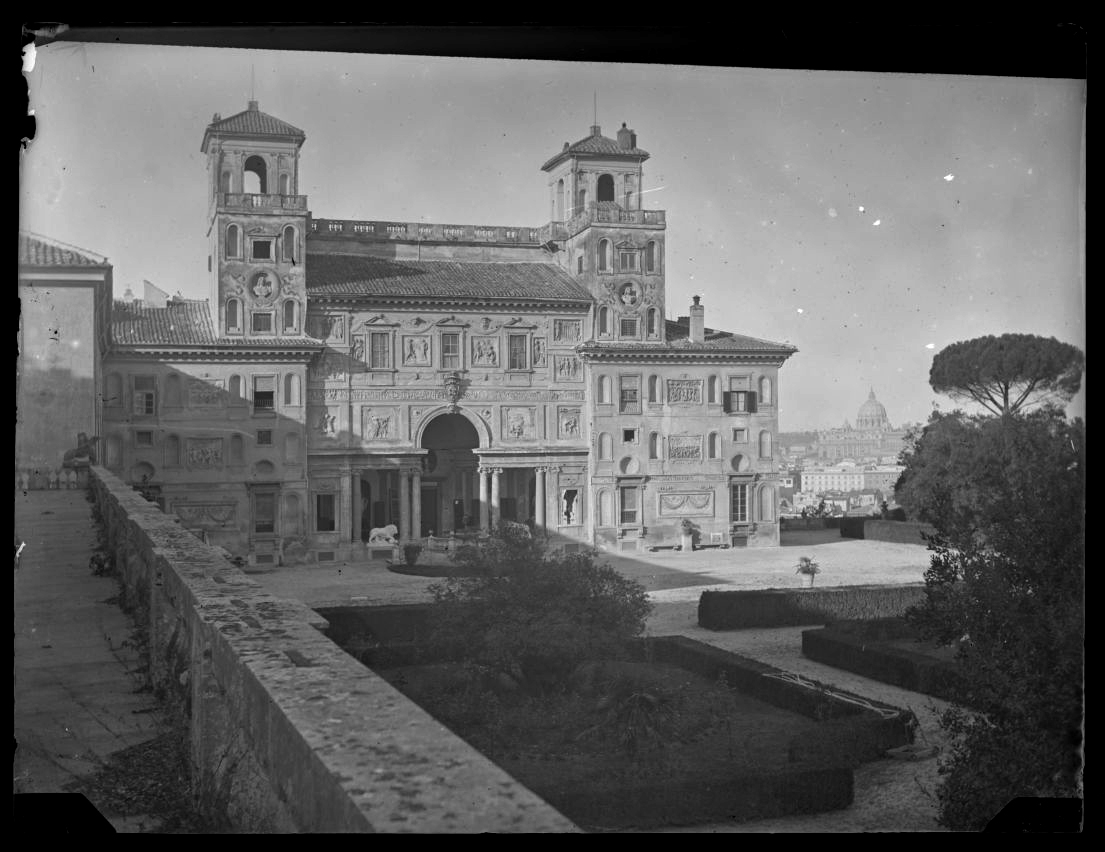 Vue de la façade de la Villa Médicis depuis la terrasse, un des deux lions visibles sous le portique, le dôme de la Basilique Saint Pierre en arrière plan, vers 1891. Technique : Négatif au gélatino-bromure d'argent Support : Plaque de verre Taille : 9x12cm